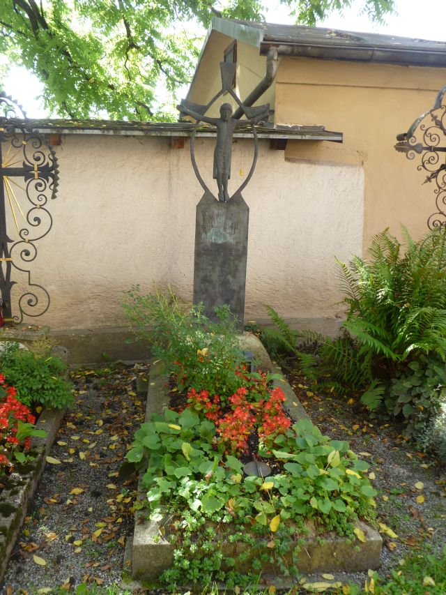 Grabstätte von Thomas Michels; Kloster Nonnberg